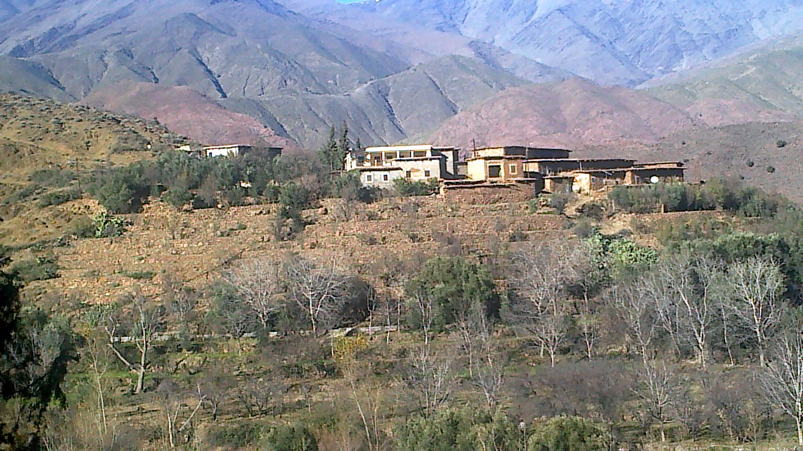 منظر من جبال الأطلس الكبير, يطل على نهر نفيس.